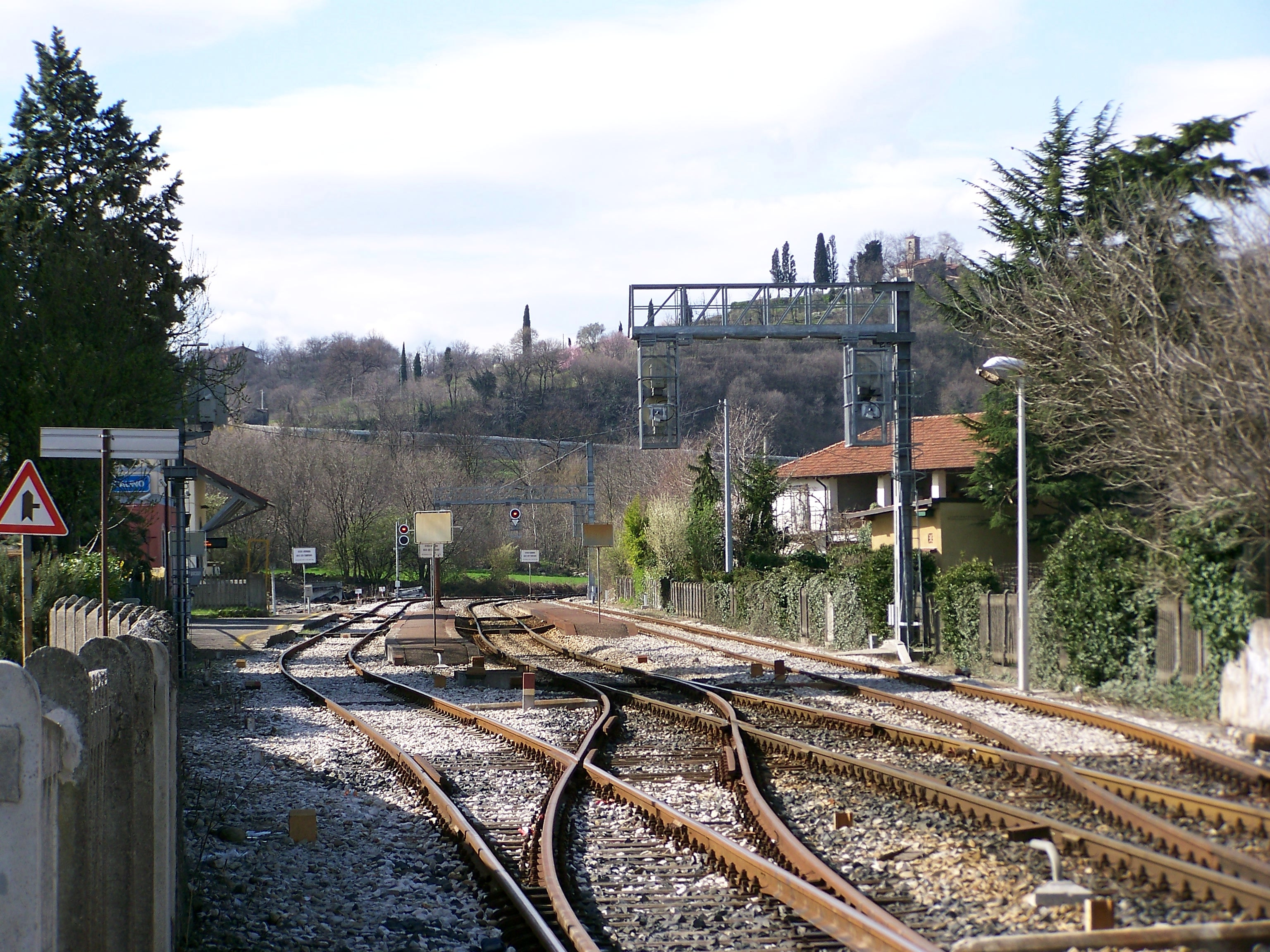 Il piazzale del ferro della stazione di Bornato-Calino. Da sinistra: il binario di corsa della Bornato-Rovato, il binario di corsa della Brescia-Iseo-Edolo e il binario di precedenza di quest'ultima.